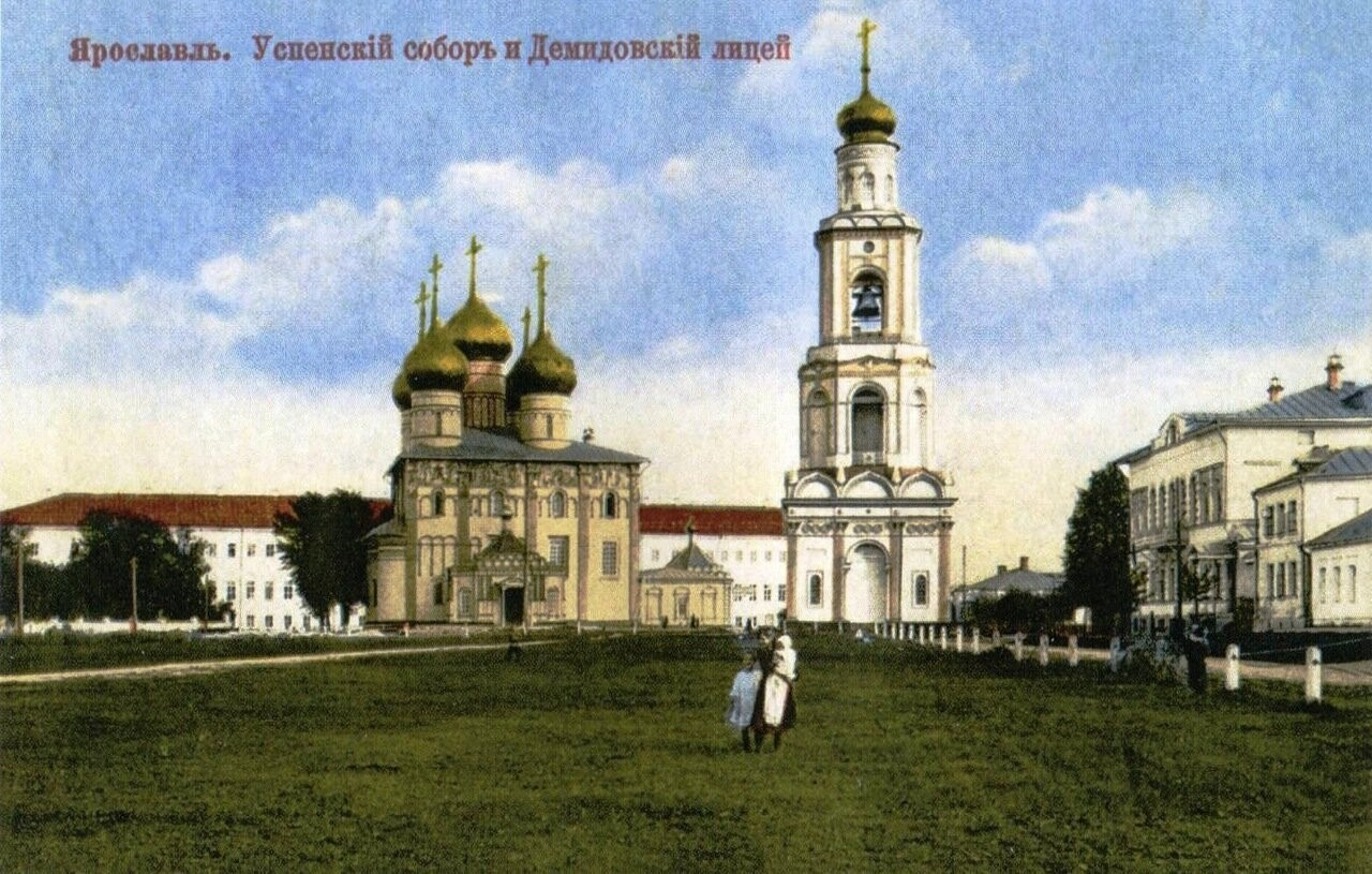 Старый Ярославль. Успенский собор. За ним - Демидовский юридический лицей